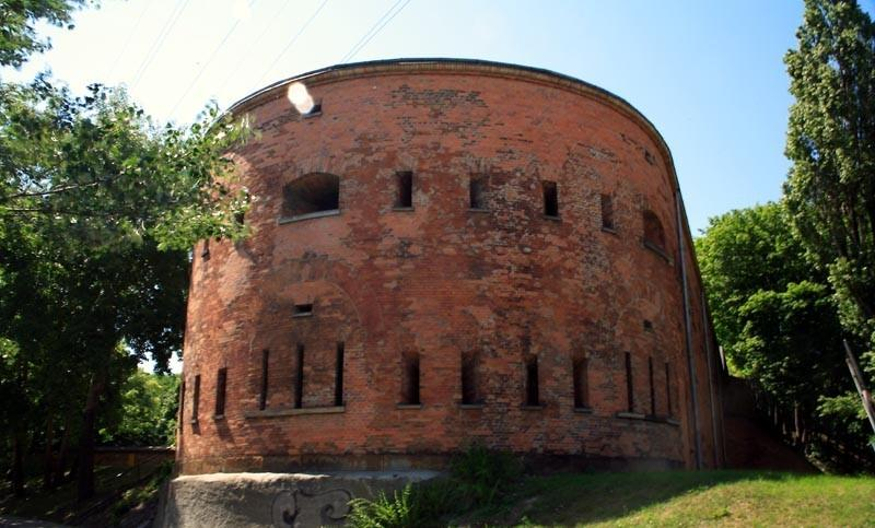 Warszawa (Polska)